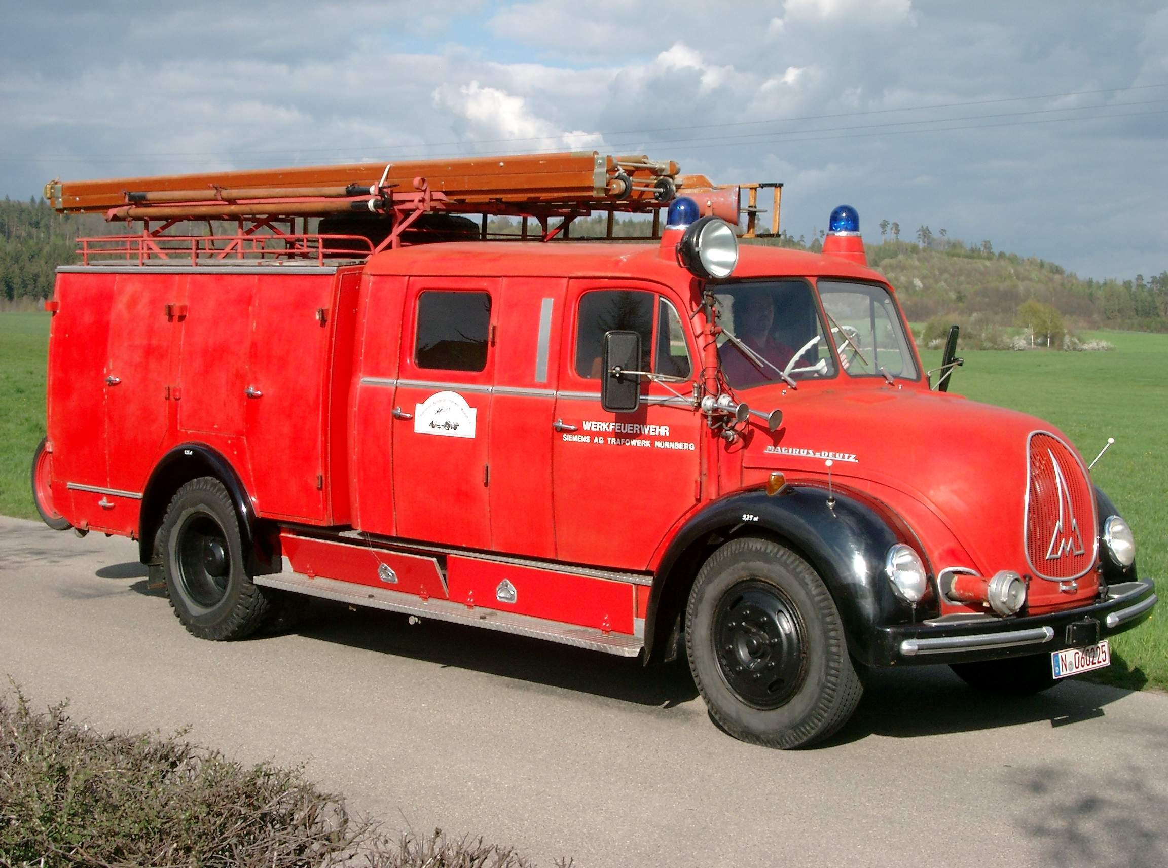 Löschgruppenfahrzeug LF 16 (ehemals Werksfeuerwehr Siemens Nürnberg)